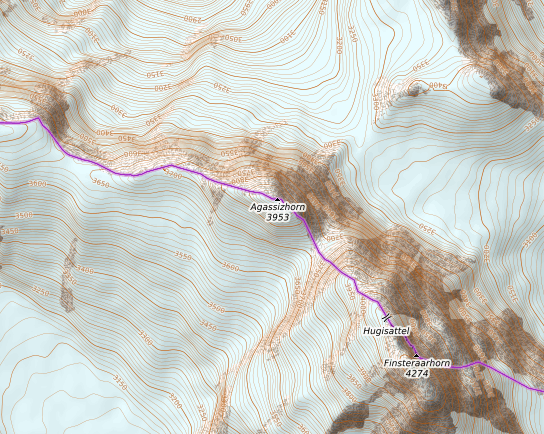 carte réalisée sur umap This map may be incomplete, and may contain errors. Don't rely solely on it for navigation.